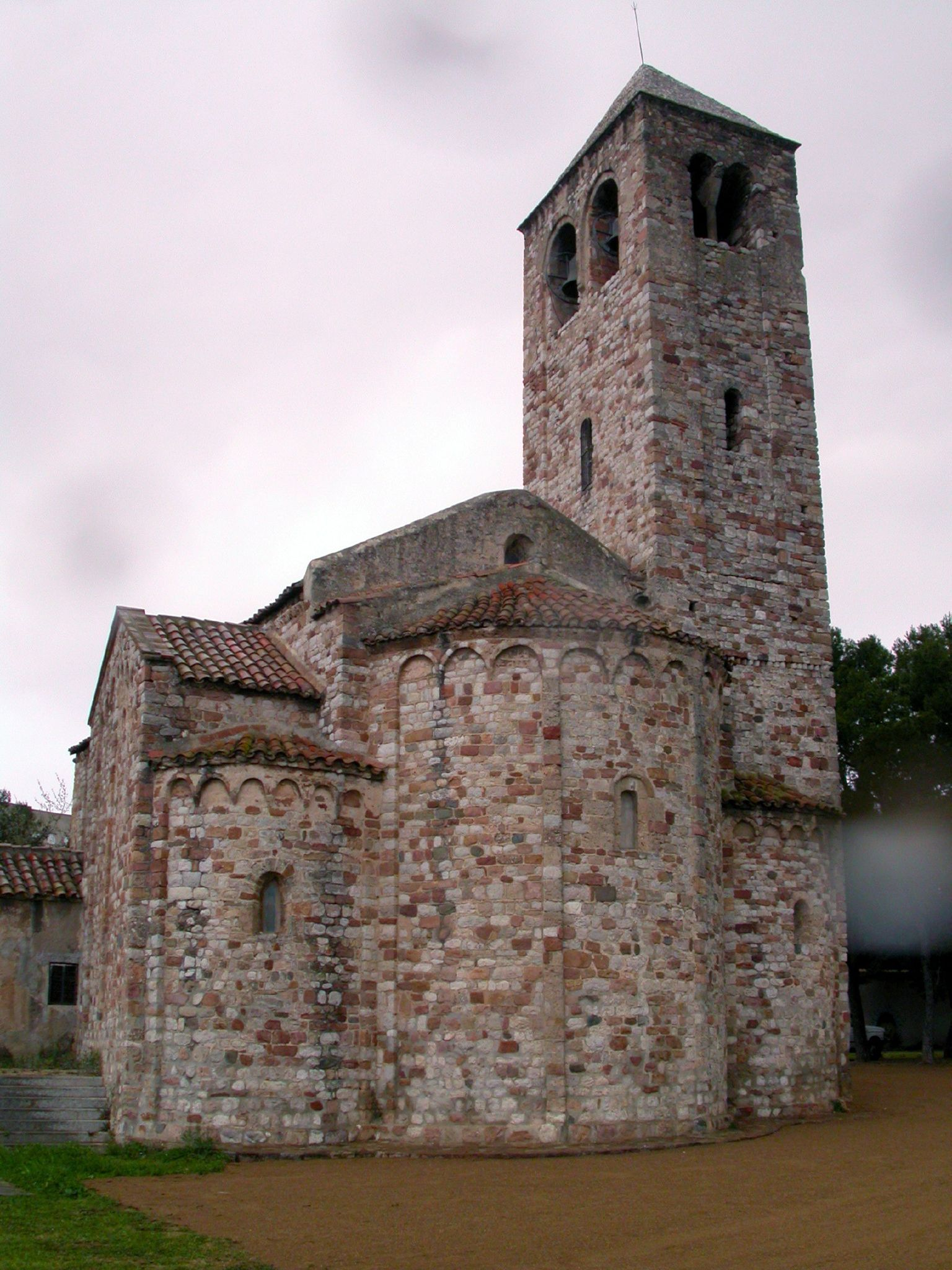 Església de Santa maria de Barberà, a Barberà del Vallès